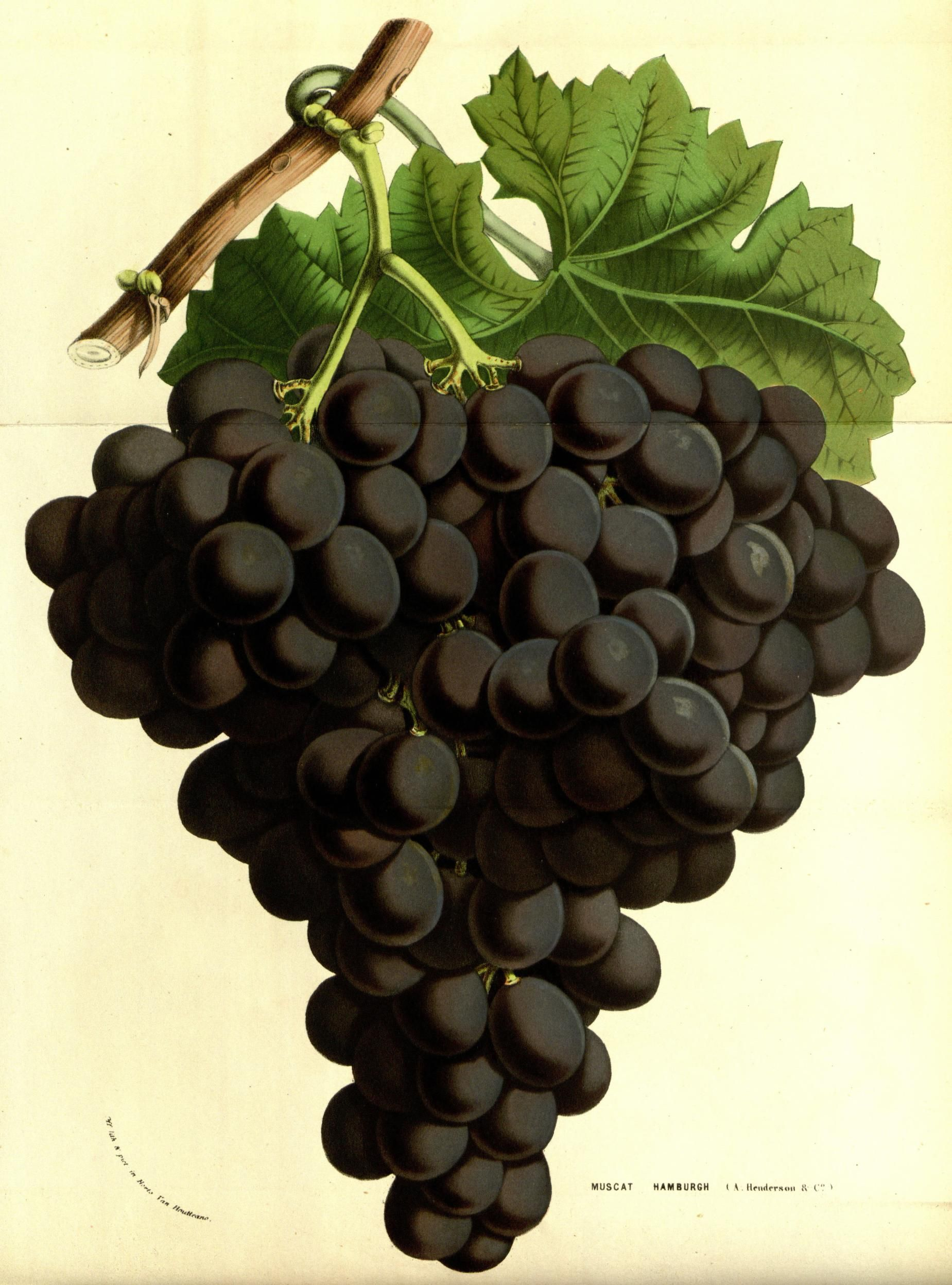 Illustration du cépage Muscat de Hambourg dans " Flore des serres et des jardins de l'Europe - Journal Général d'Horticulture " sous la direction de J.Decaisne et édité par Louis Van Houtte - Treizième édition de 1858.